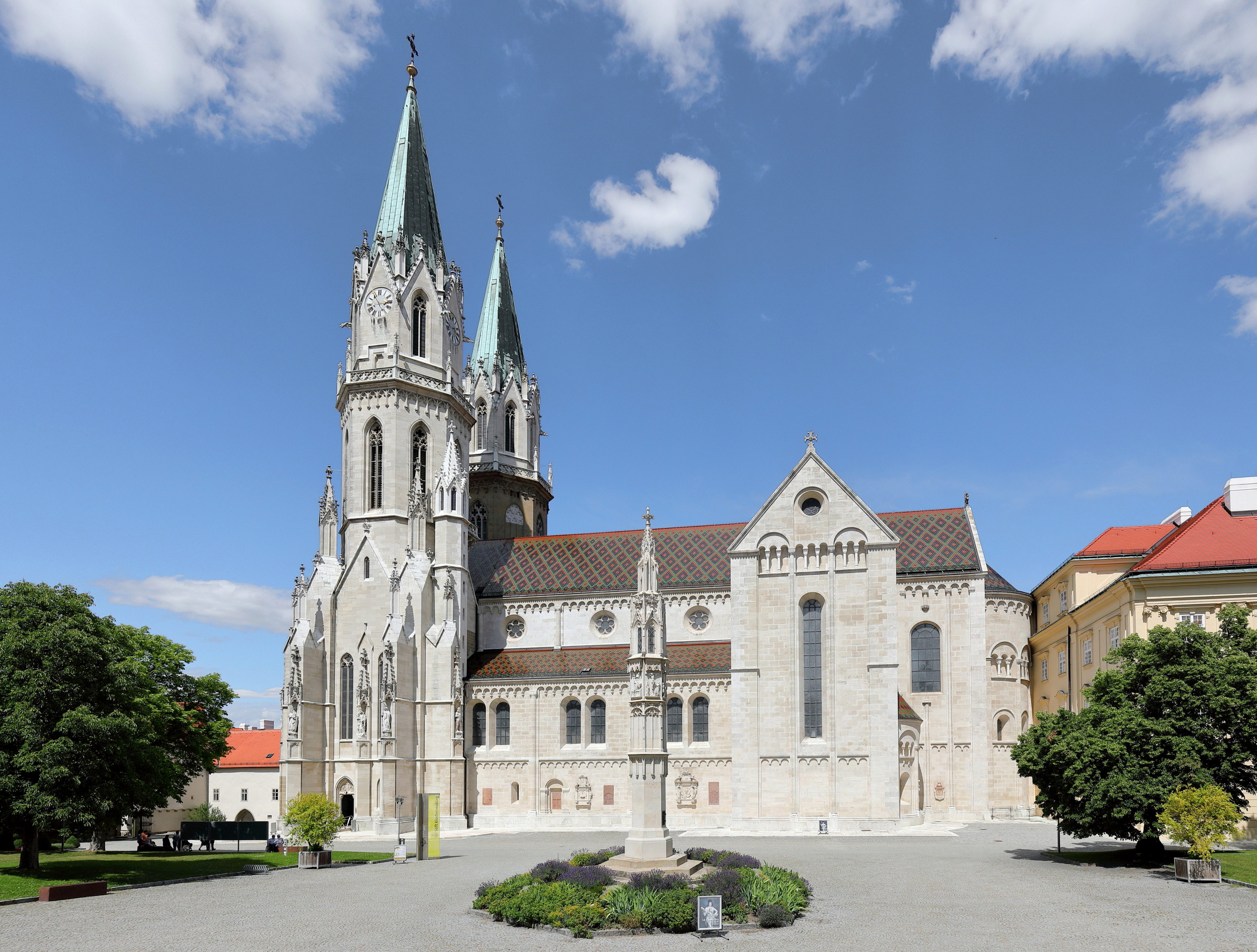 Südwestansicht der Kirche des Augustiner-Chorherren-Stiftes in der niederösterreichischen Stadt Klosterneuburg und davor die Tutzsäule.